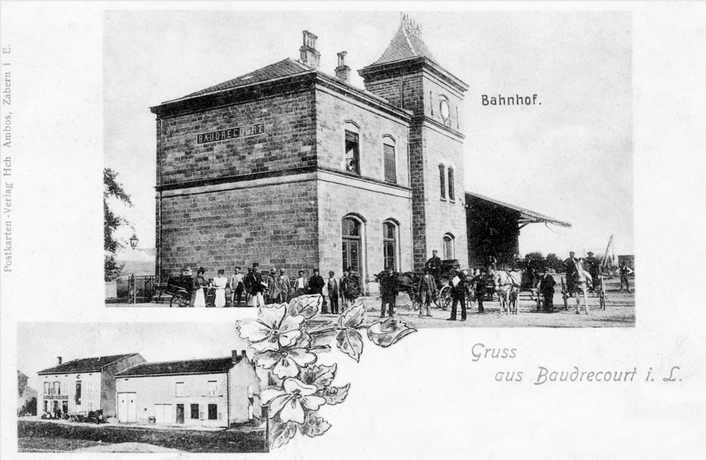 La gare au début des années 1900, alors qu'elle est en zone annexée avec son bâtiment voyageurs réalisé par les allemands.